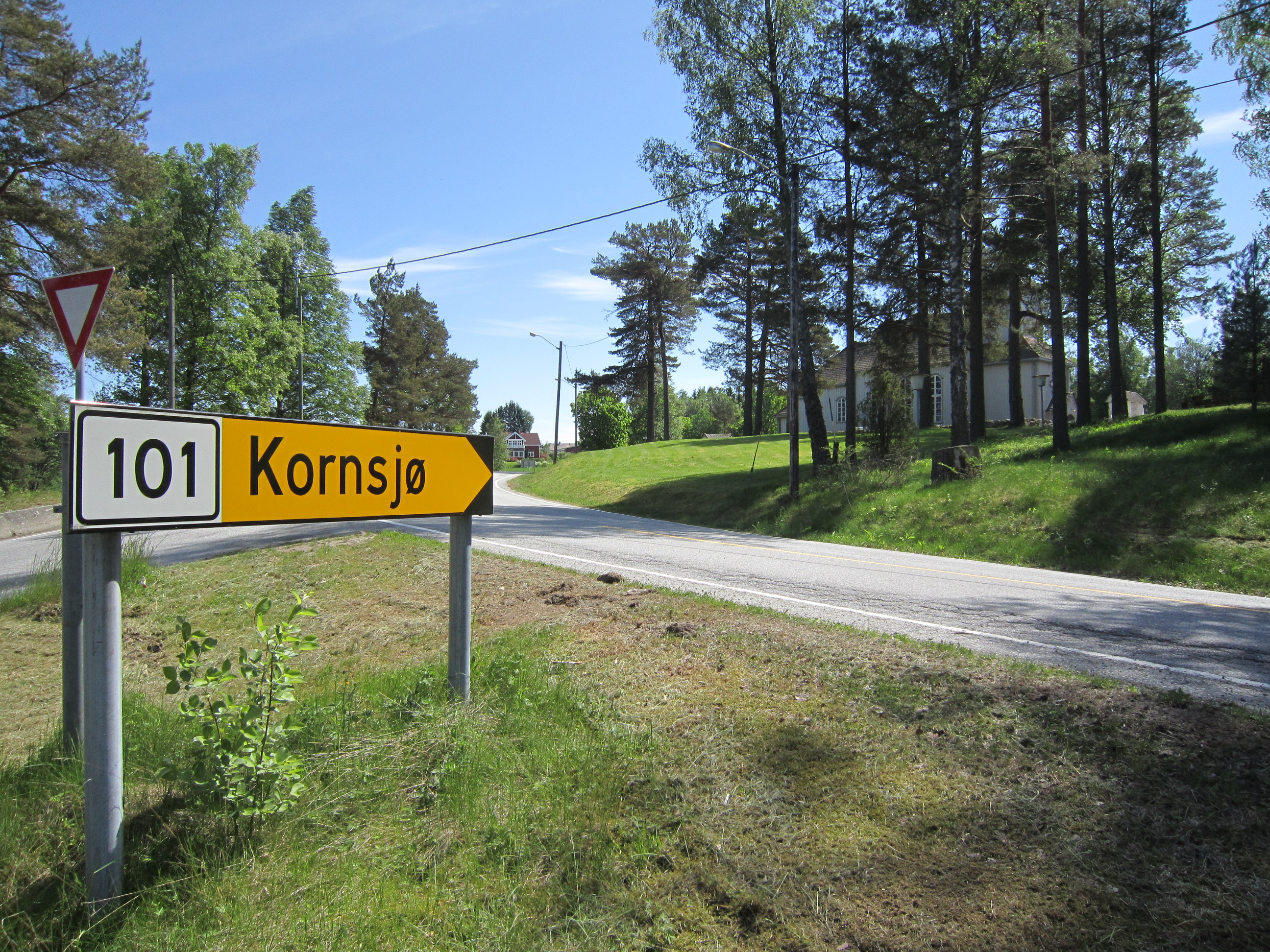 Primær fylkesvei 101 gikk forbi Prestebakke kirke.